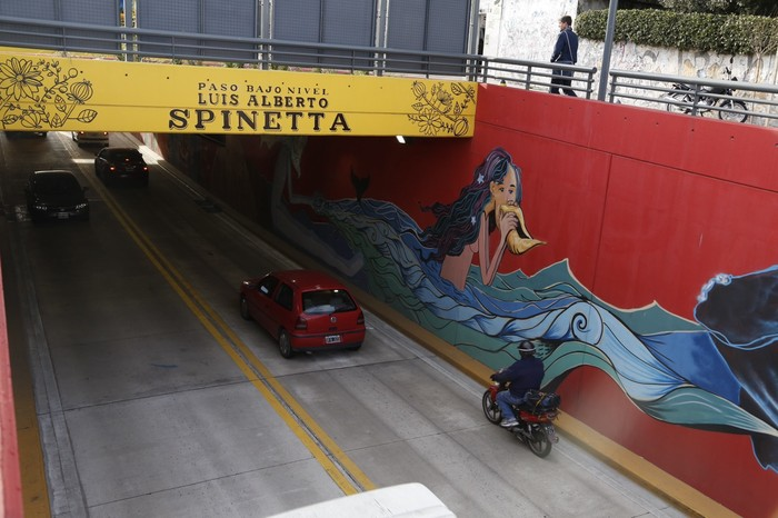 Paso bajo nivel Luis Alberto Spinetta. Buenos Aires, Villa Urquiza, Av. Congreso. La decisión de nombrar el paso bajo nivel fue realizada por votación vecinal, en la que participaron 60.000 vecinos. El túnel fue embellecido artísticamente con reproducciones de 30 tapas de álbumes de distintas etapas del músico. Luis Alberto Spinetta fue un vecino destacado de Villa Urquiza durante más de 20 años, donde se mudó en 1989 y allí se quedó hasta su muerte, el 8 de febrero de 2012. Primero fue en la calle Miller y Manuela Pedraza, muy cerca de donde ahora está el boulevard Roberto Goyeneche. Años después se mudó a la calle Iberá al 5000, entre Pacheco y Díaz Colodrero, donde además instaló su estudio de grabación La Diosa Salvaje, título de uno de los temas que había grabado con Spinetta Jade.